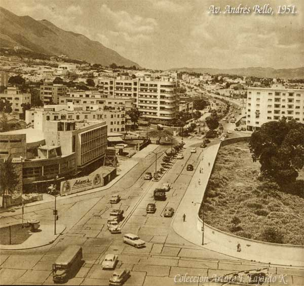 Avenida Andres Bello 1951